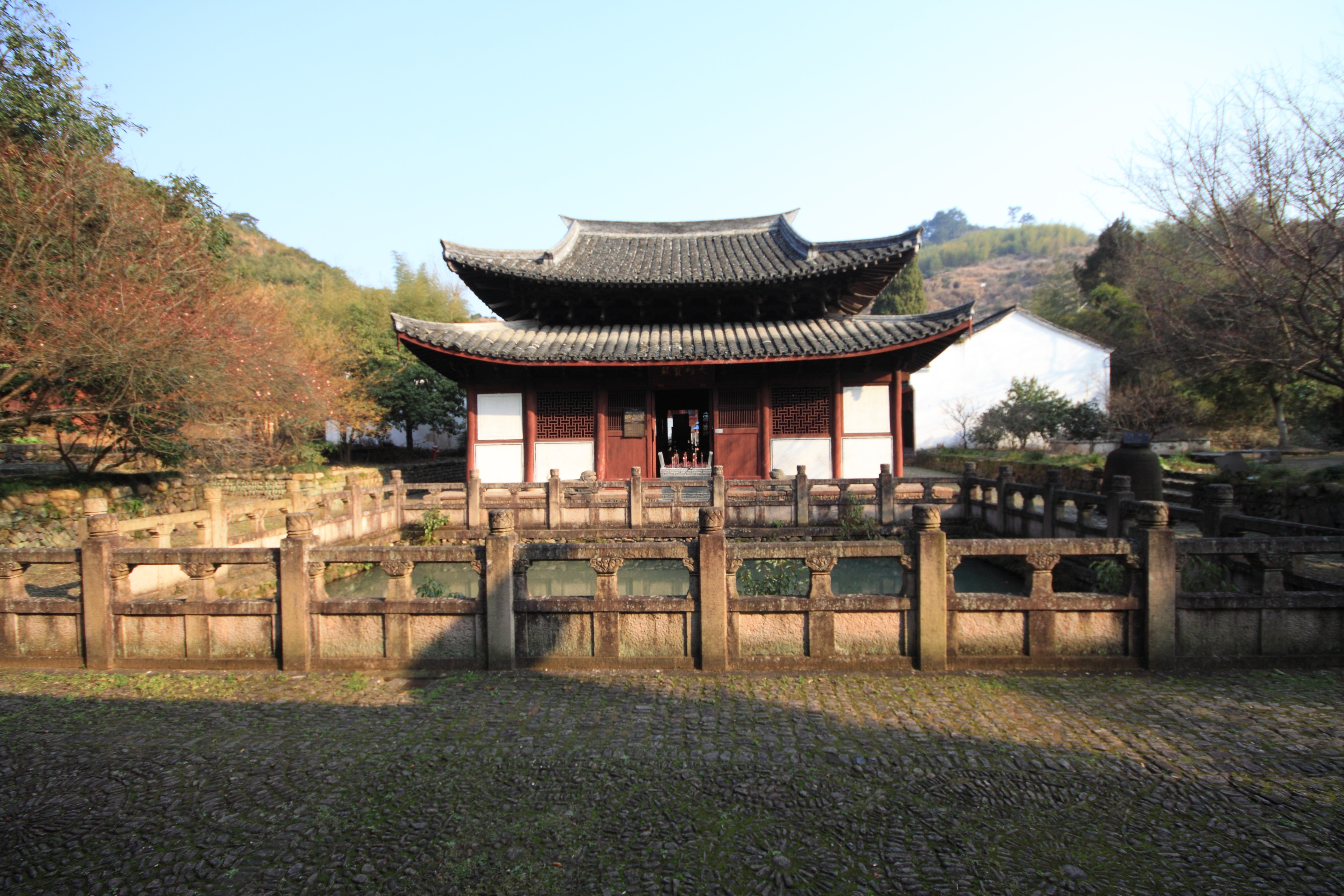 延福寺大殿，位于中国浙江省武义县，是全国重点文物保护单位。